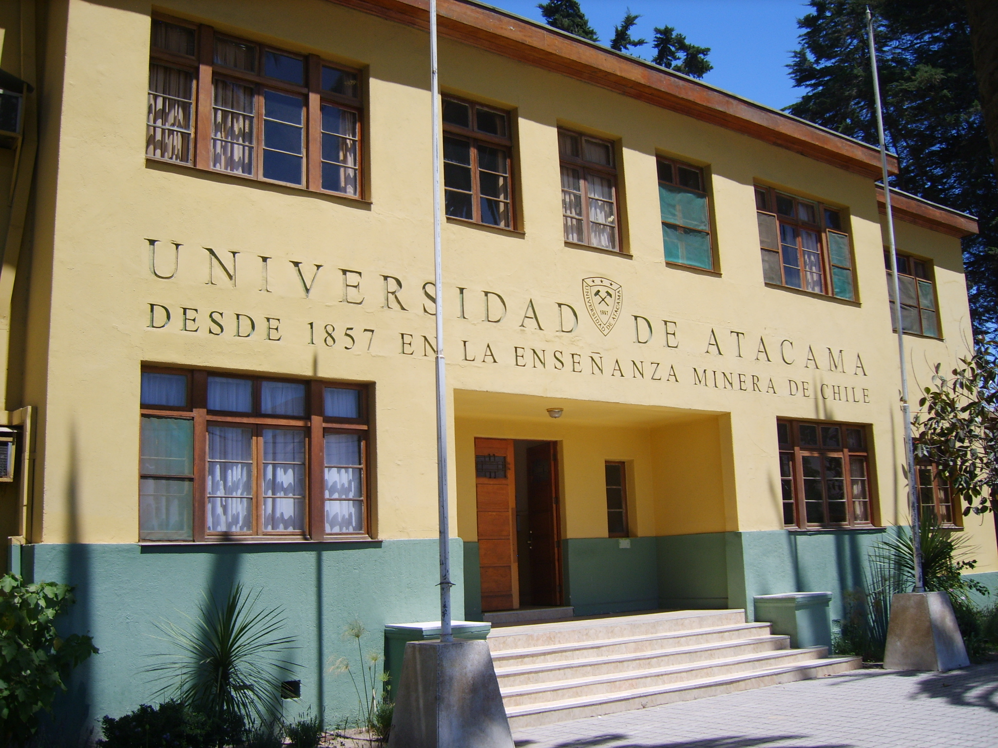 Universidad de Atacama